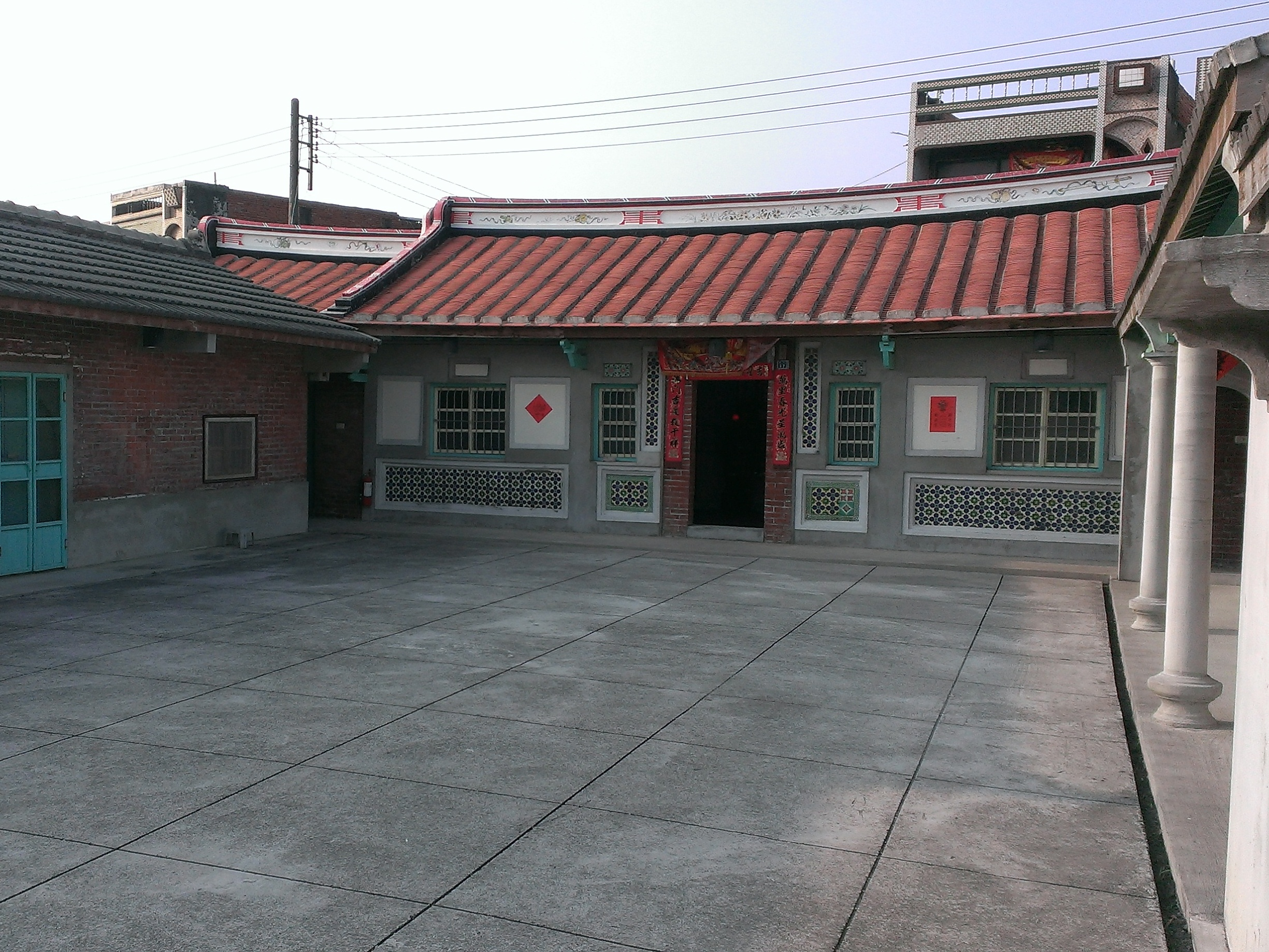 褒忠鄧麗君幼年故居，雲林縣歷史建築，位於雲林縣褒忠鄉田洋村